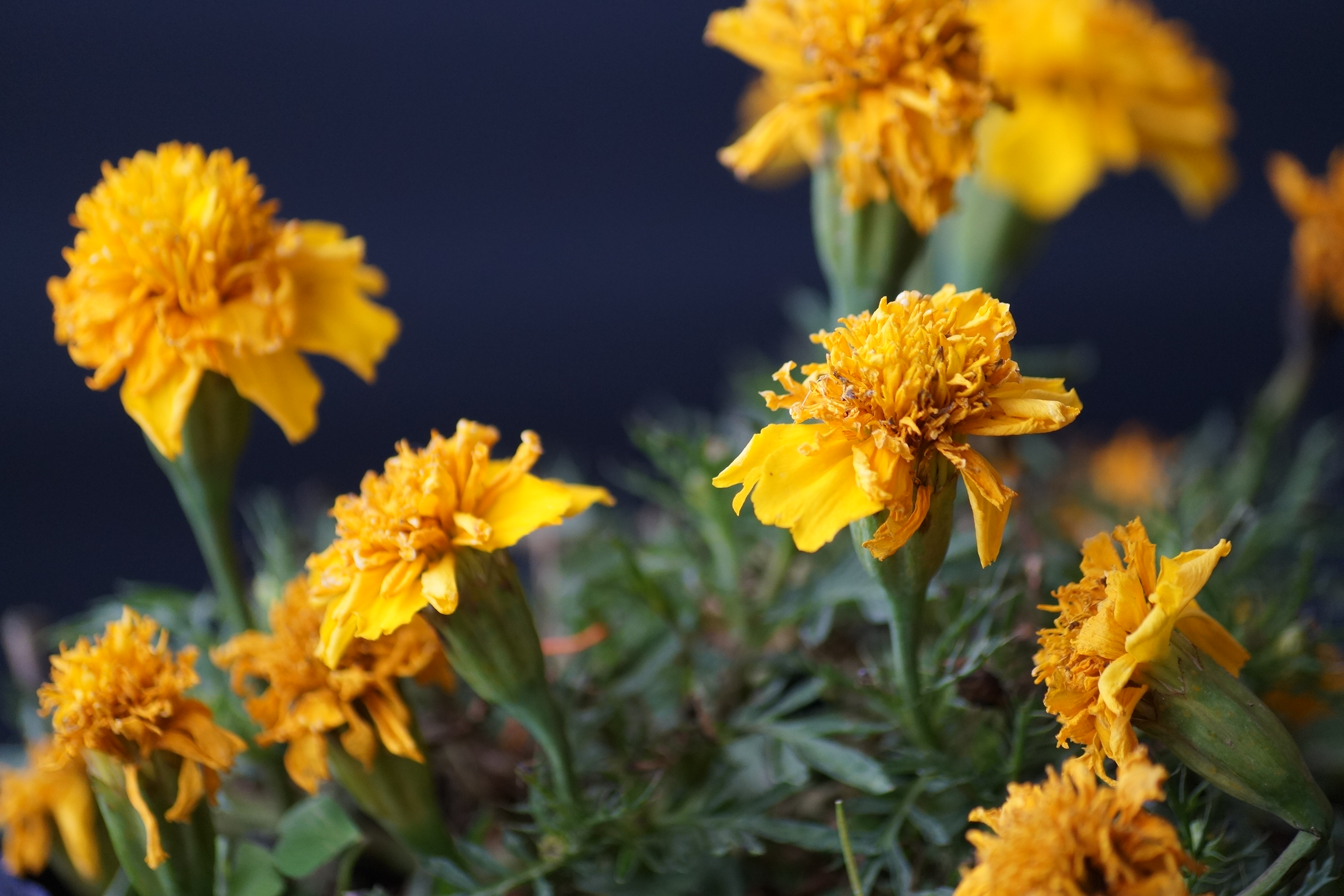 Flor de cempasúchil, close-up.